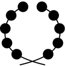 上七軒 紋章